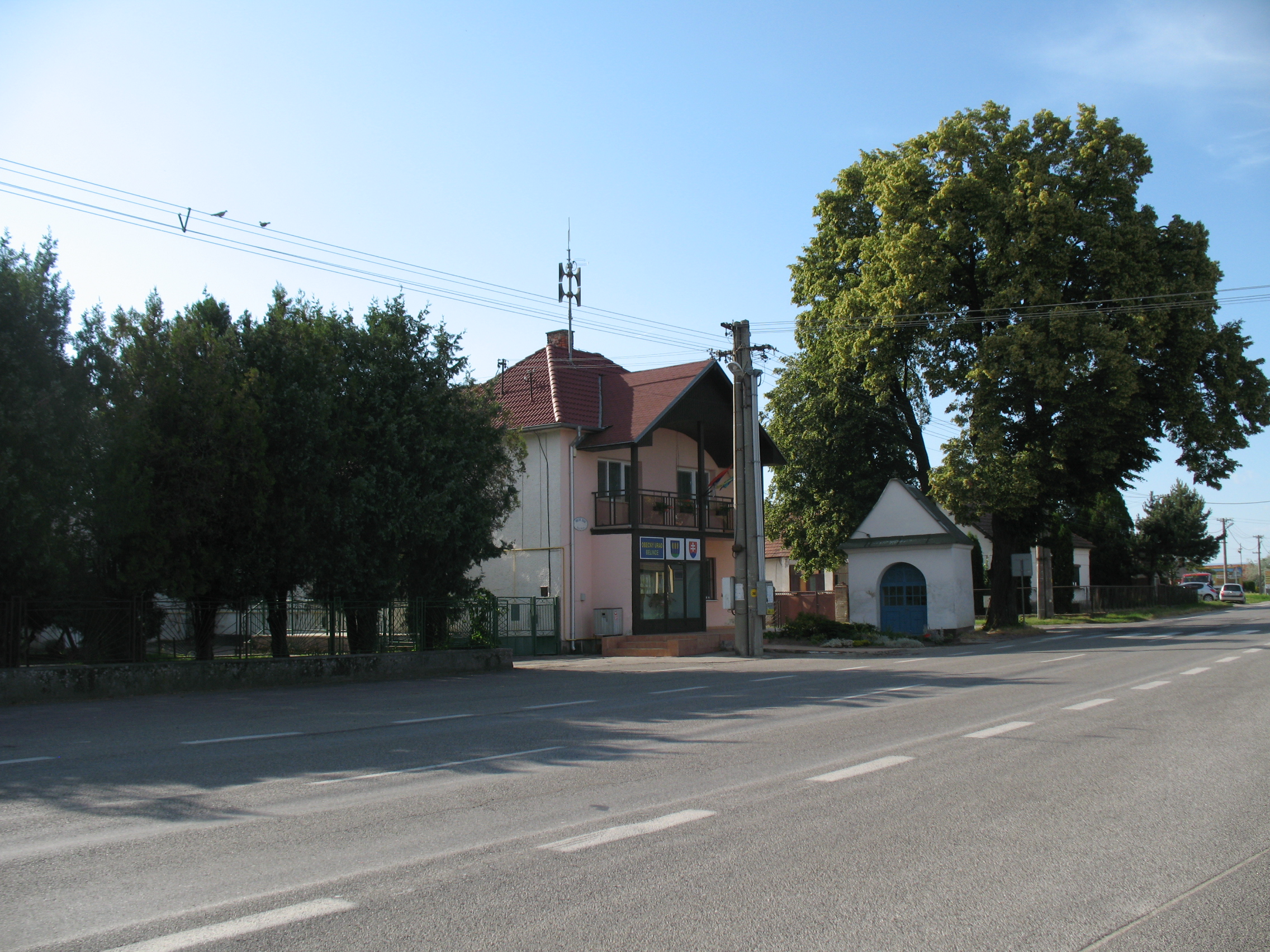 Belinc